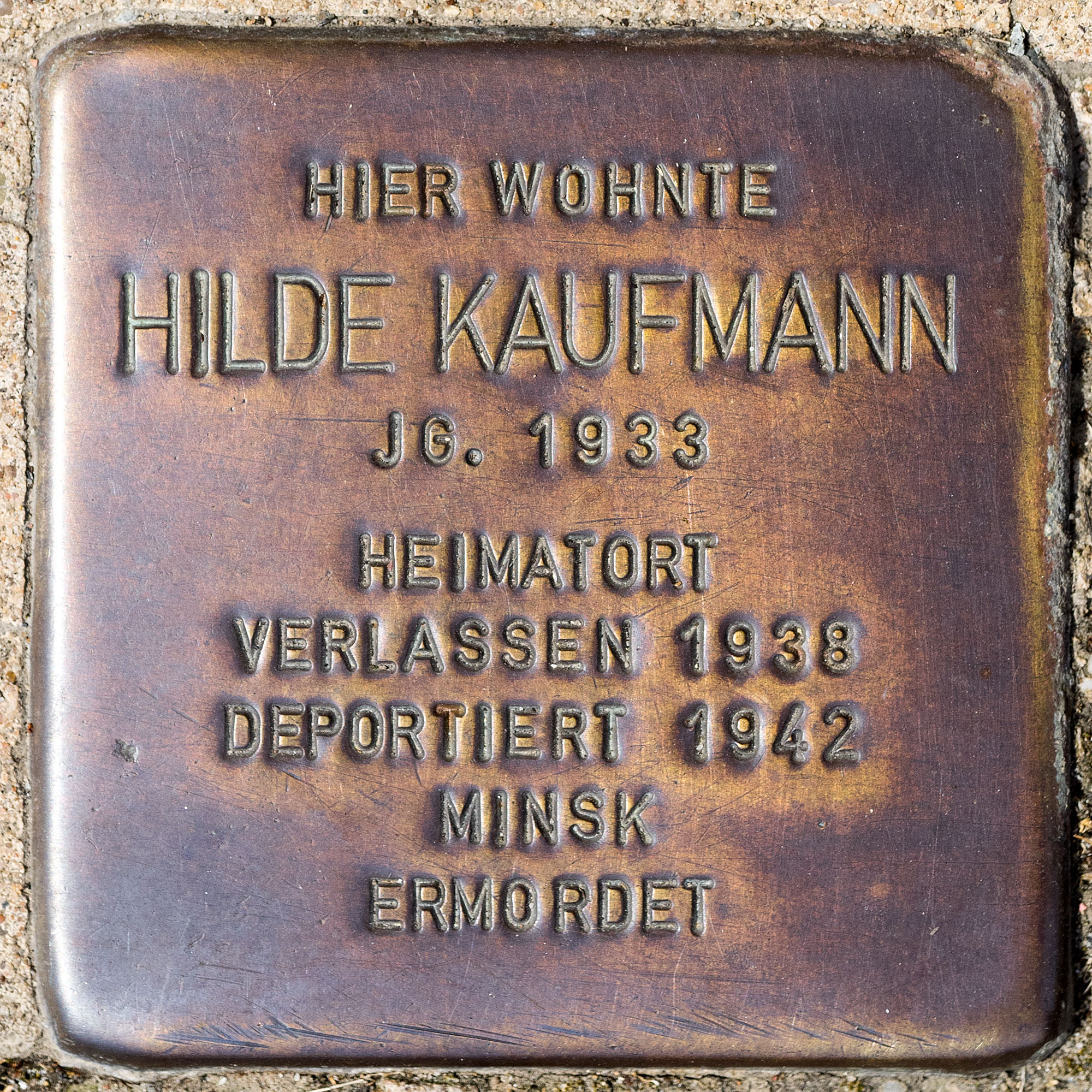 Stolpersteine Roki: Kaufmann, Hilde